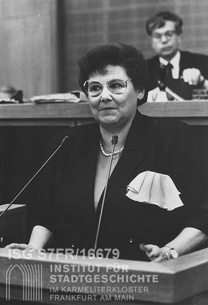 Ute Hochgrebe am Rednerpult